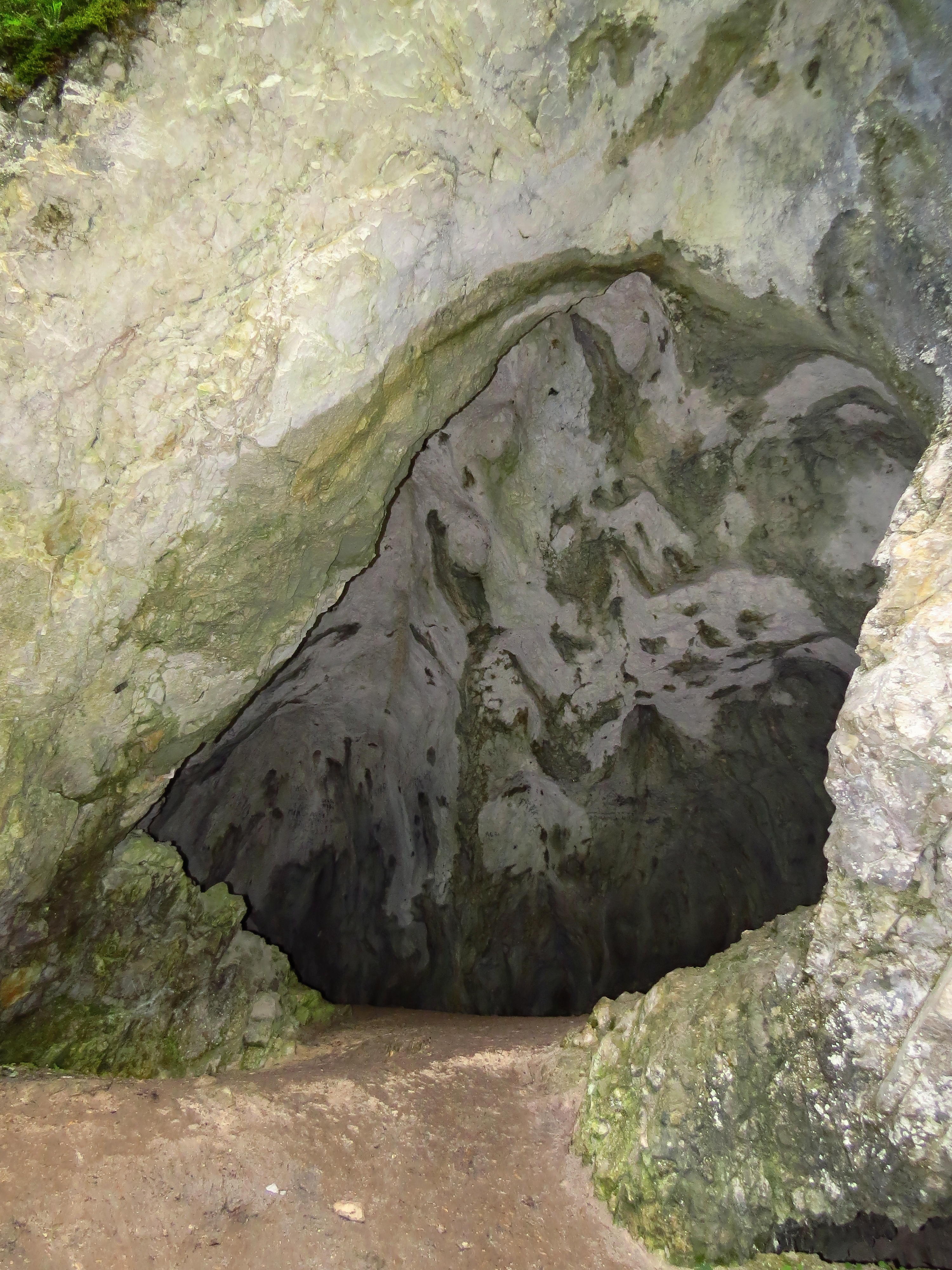 Vchod do jeskyně